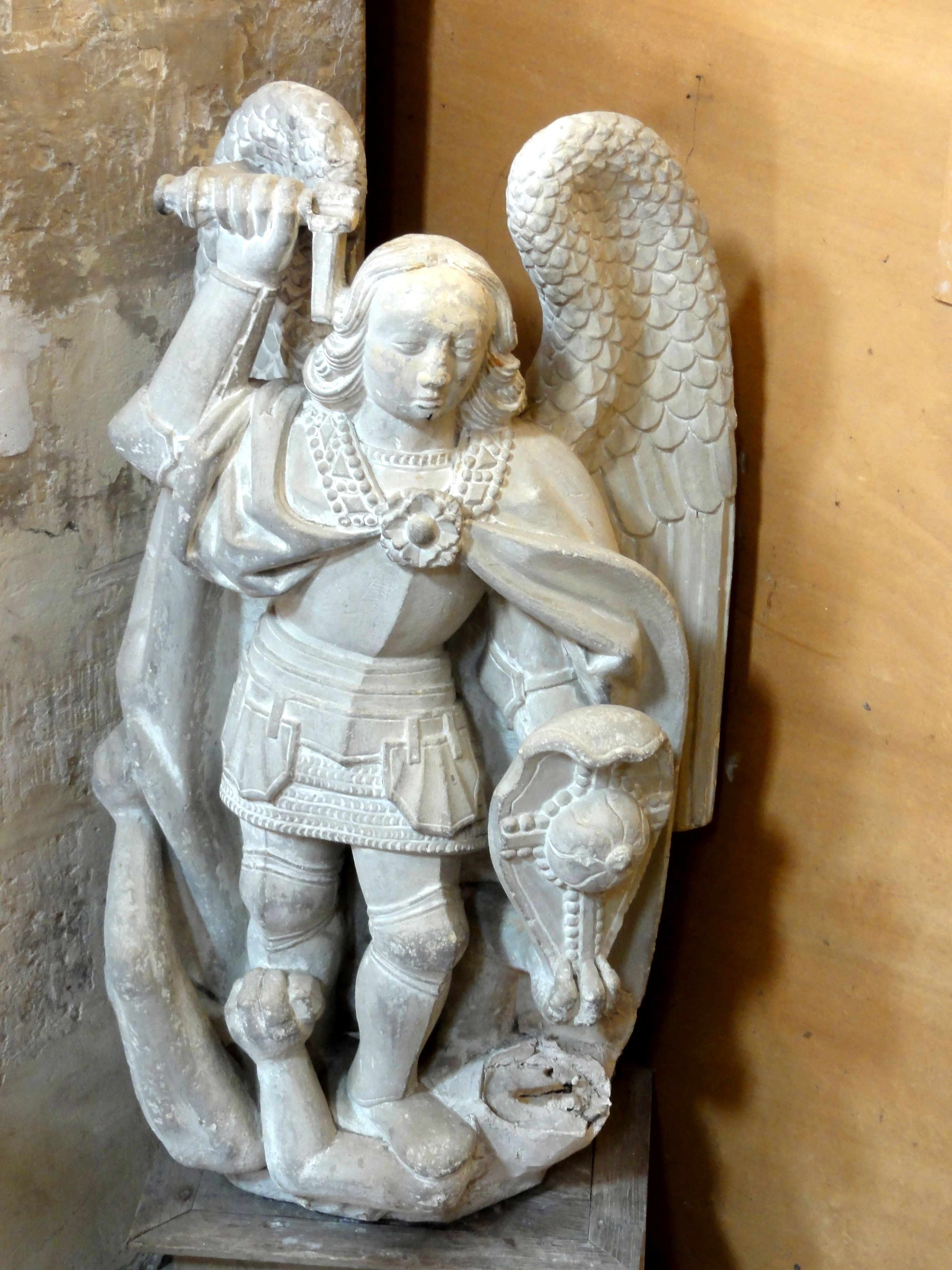 Statue de saint Michel terrassant le dragon.